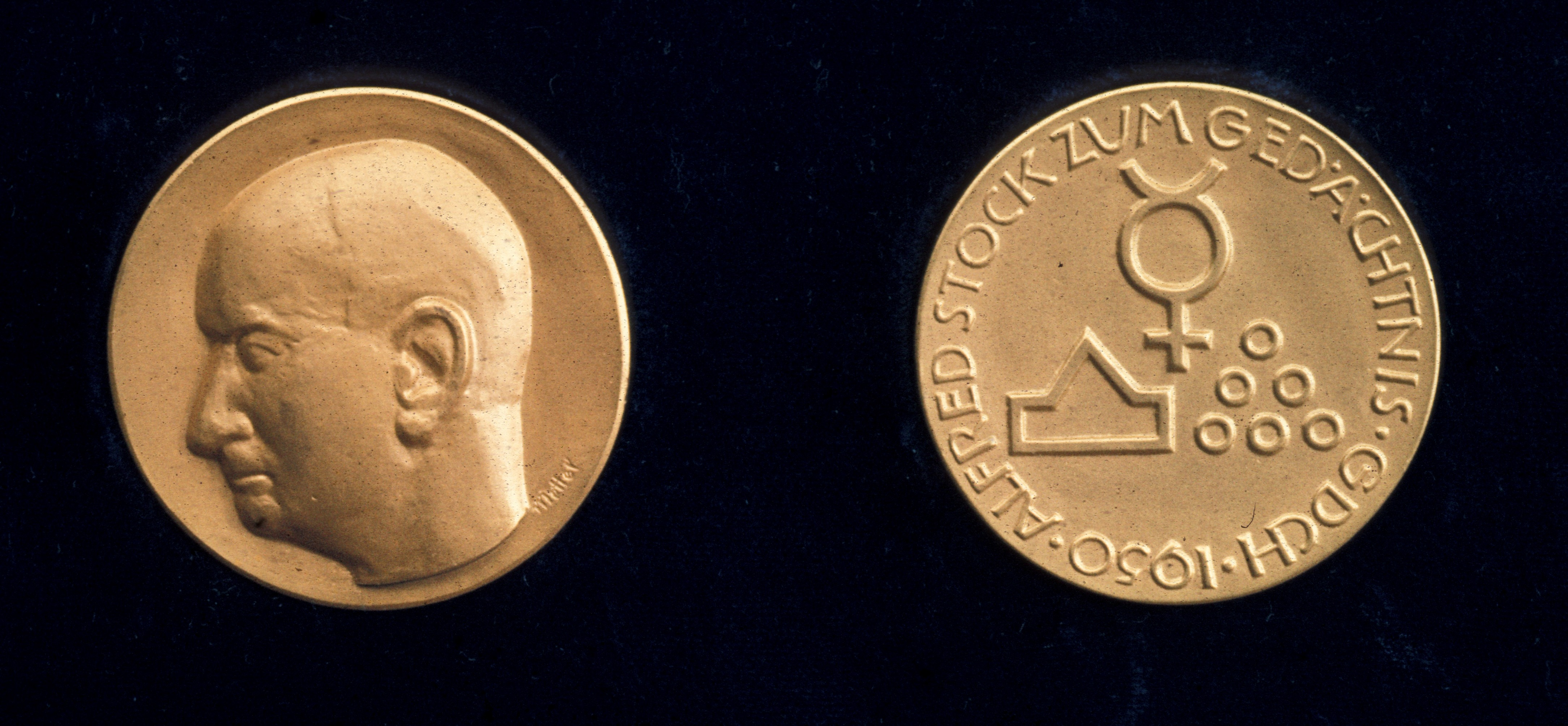 Abbildung der Medaille